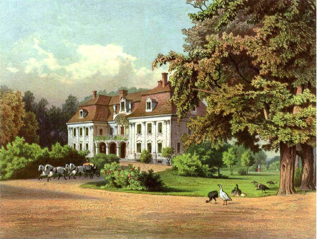 Schloss Deichslau, Kreis Steinau